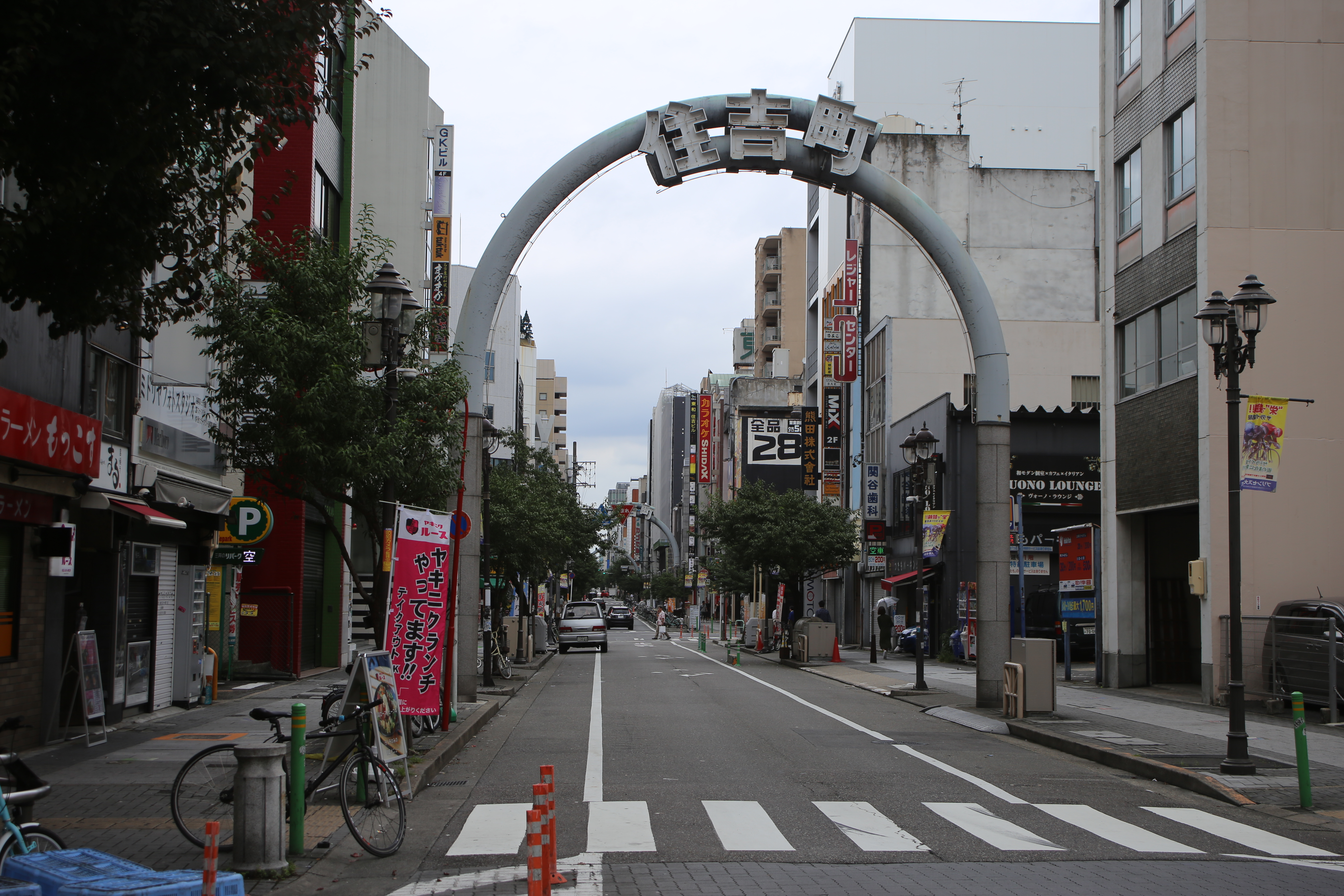 名古屋市中区栄三丁目の路上に設置された「住吉町」のモニュメントを南側より撮影